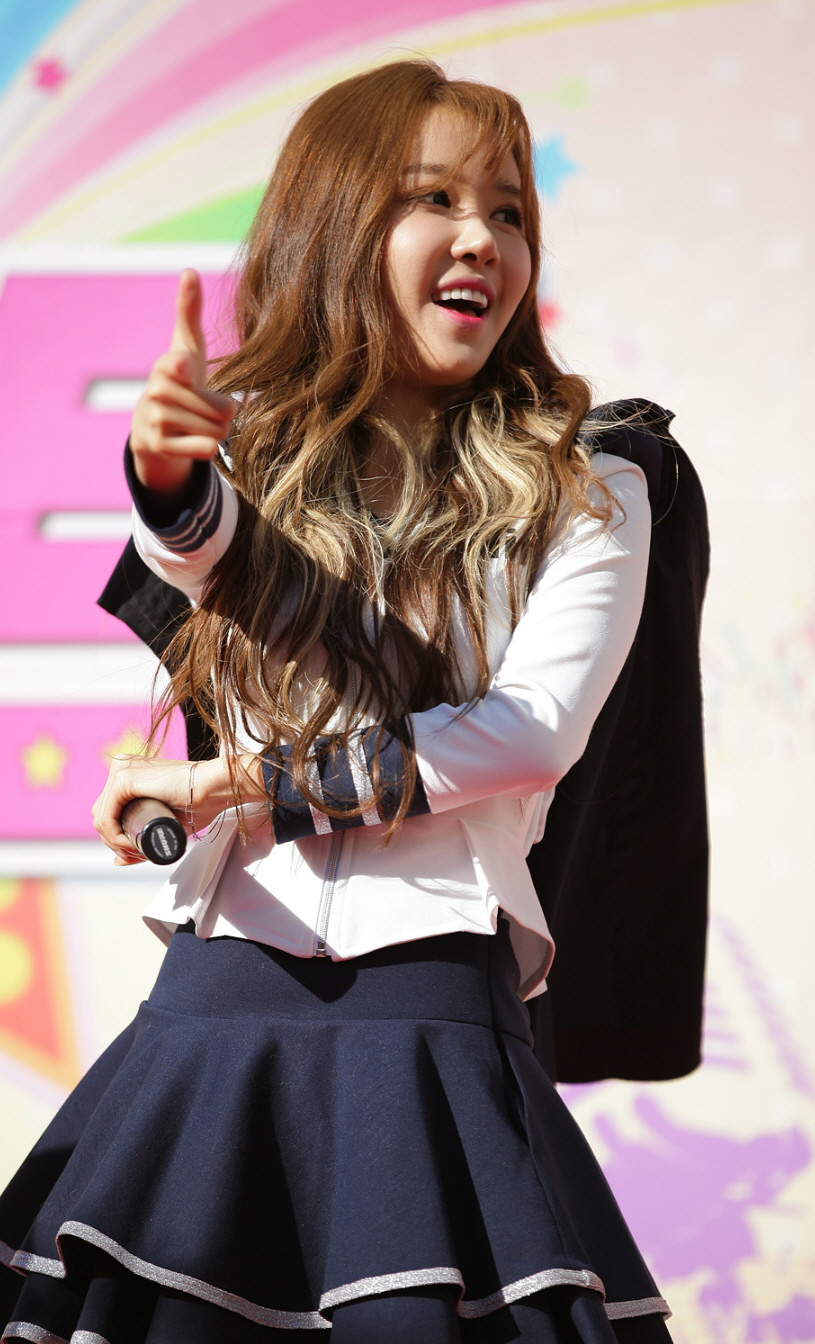 크레용팝(Crayon Pop) 도시 꼬마들의 행복한 축제 티브로드 원음방송